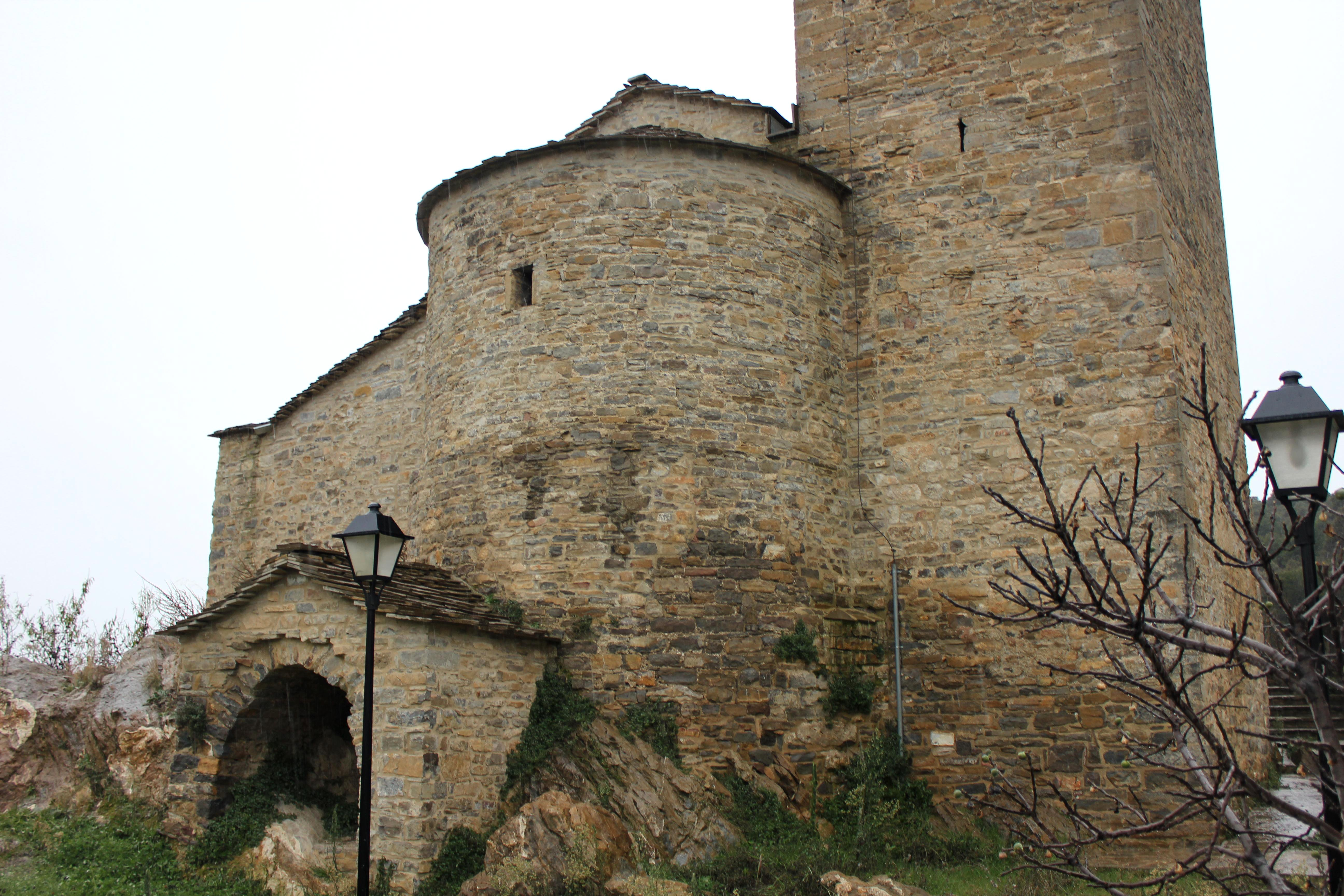 Aragonés: Abside d'a ilesia de l'Asumpción en Salinas de Trillo (A Fueva, Sobrarbe).